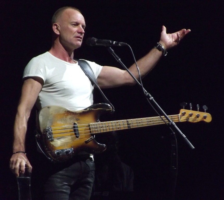 Zdjęcie zrobione podczas drugiego dnia Life Festivalu 2013 w Oświęcimiu.